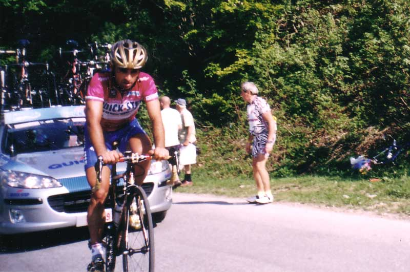 Paolo Bettini mit dem Maglia Ciclamino am Colle di Tenda beim Giro d'Italia 2005. Lomografie.